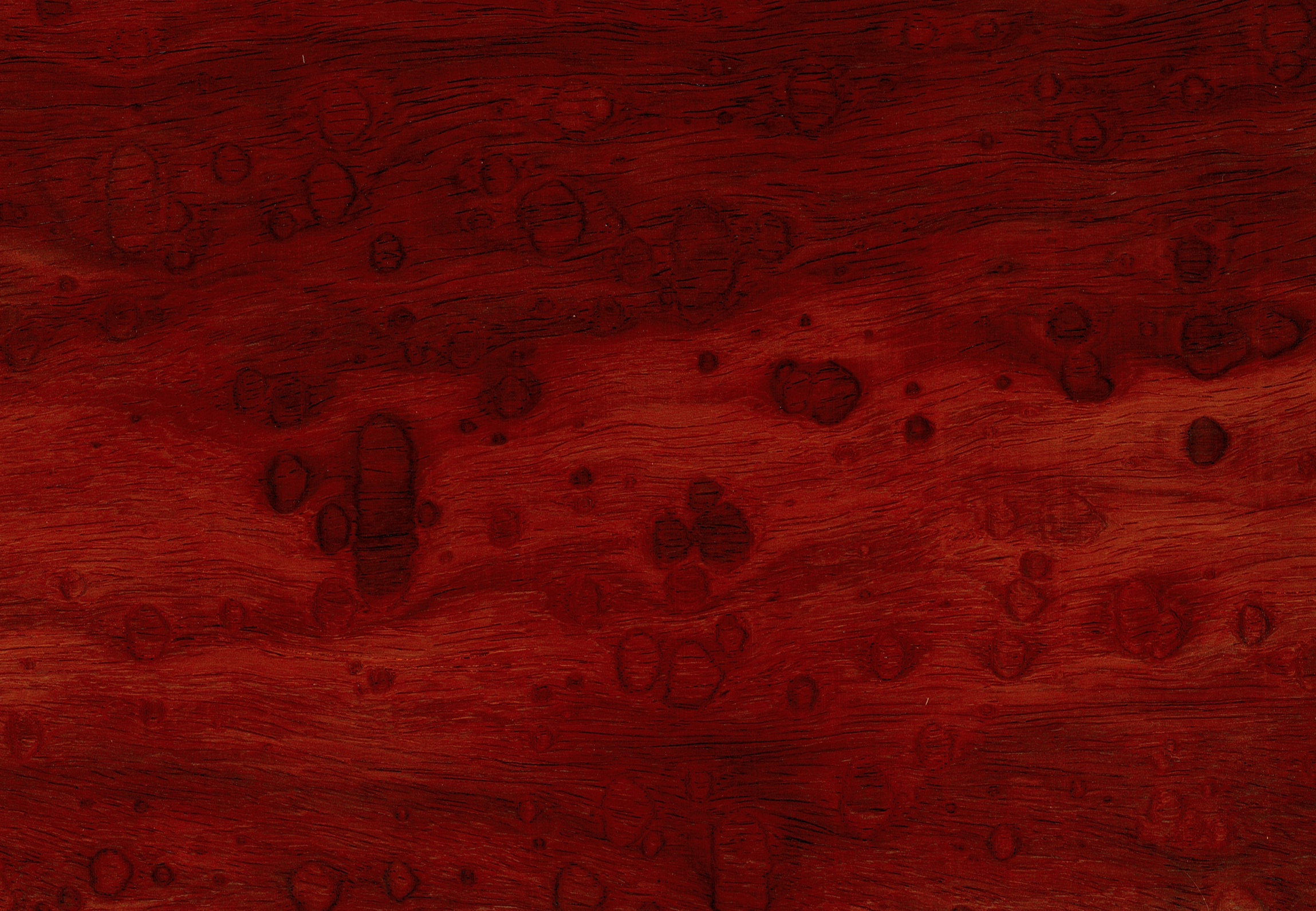 Furnierblatt eines besonderen Edelholzstammes (Padouk, Burmese Rosewood, Pterocarpus indicus) – Paduk mit Splintholz, das gemuschelte oder auch Pommelemaser ist hier eine Besonderheit, dieses Blatt gehört zum selben Stamm wie das andere Bild